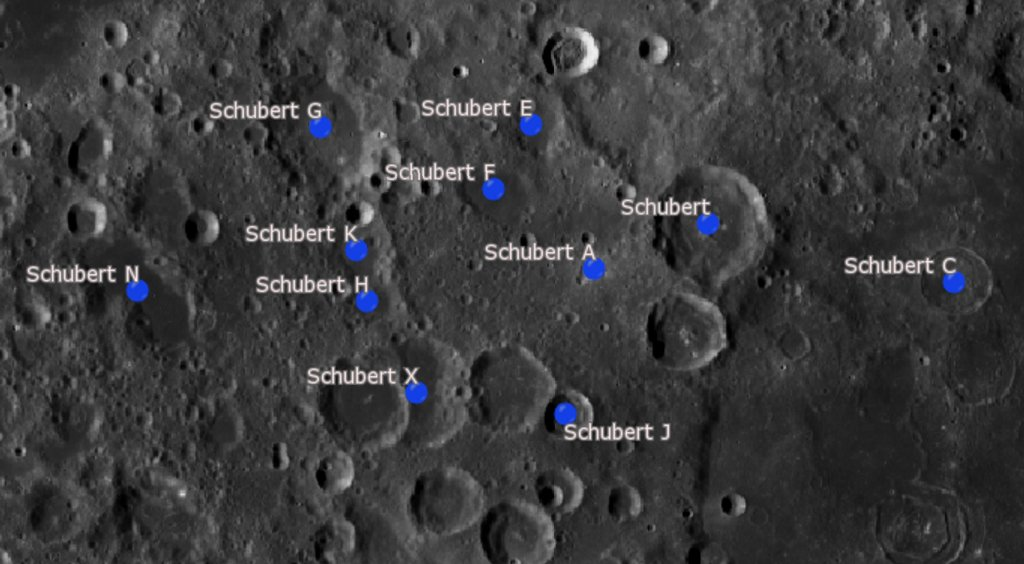 Cráter lunar Schubert. Cráteres Satélite. (Imagen LRO)